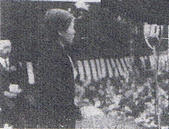 皇紀二千六百年奉祝全国基督教信徒大会奨励久布白落実